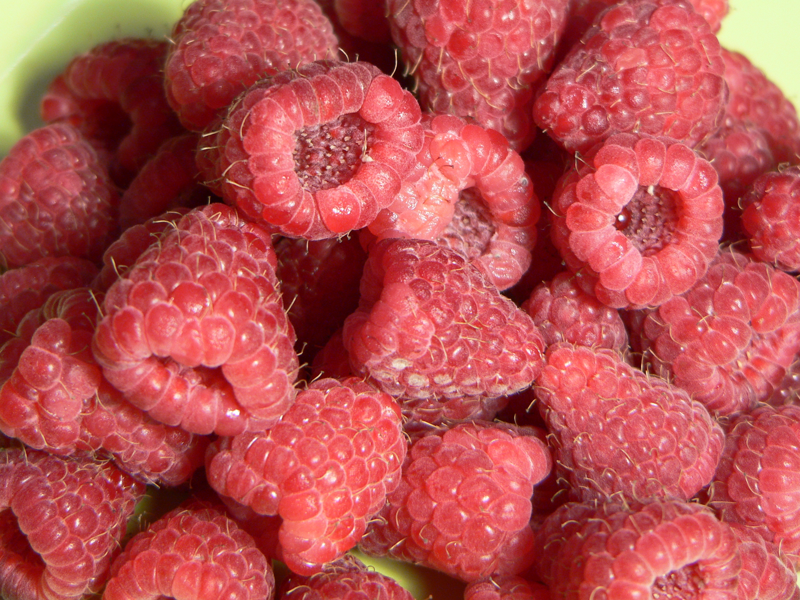 中文（中国大陆）: 成熟的覆盆子果实。